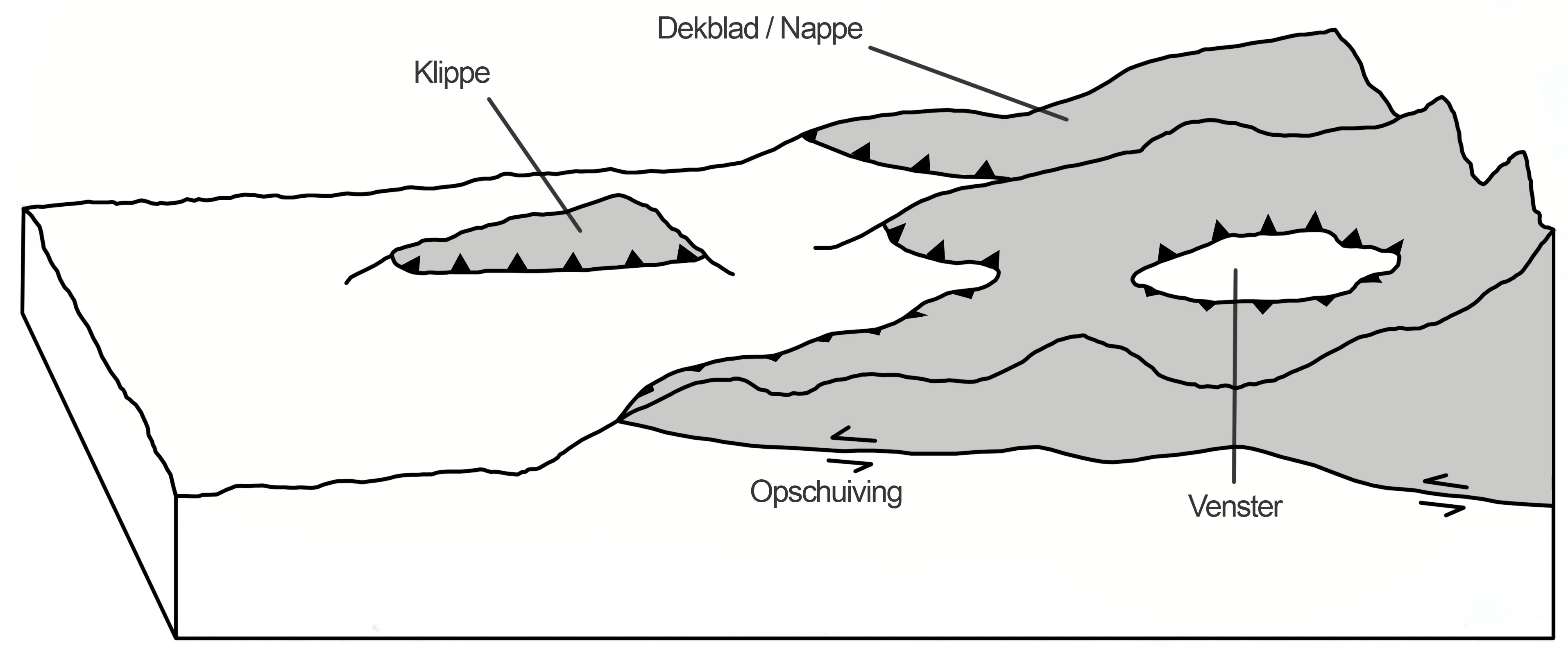 Zelf getekend. gebruiker:woudloper